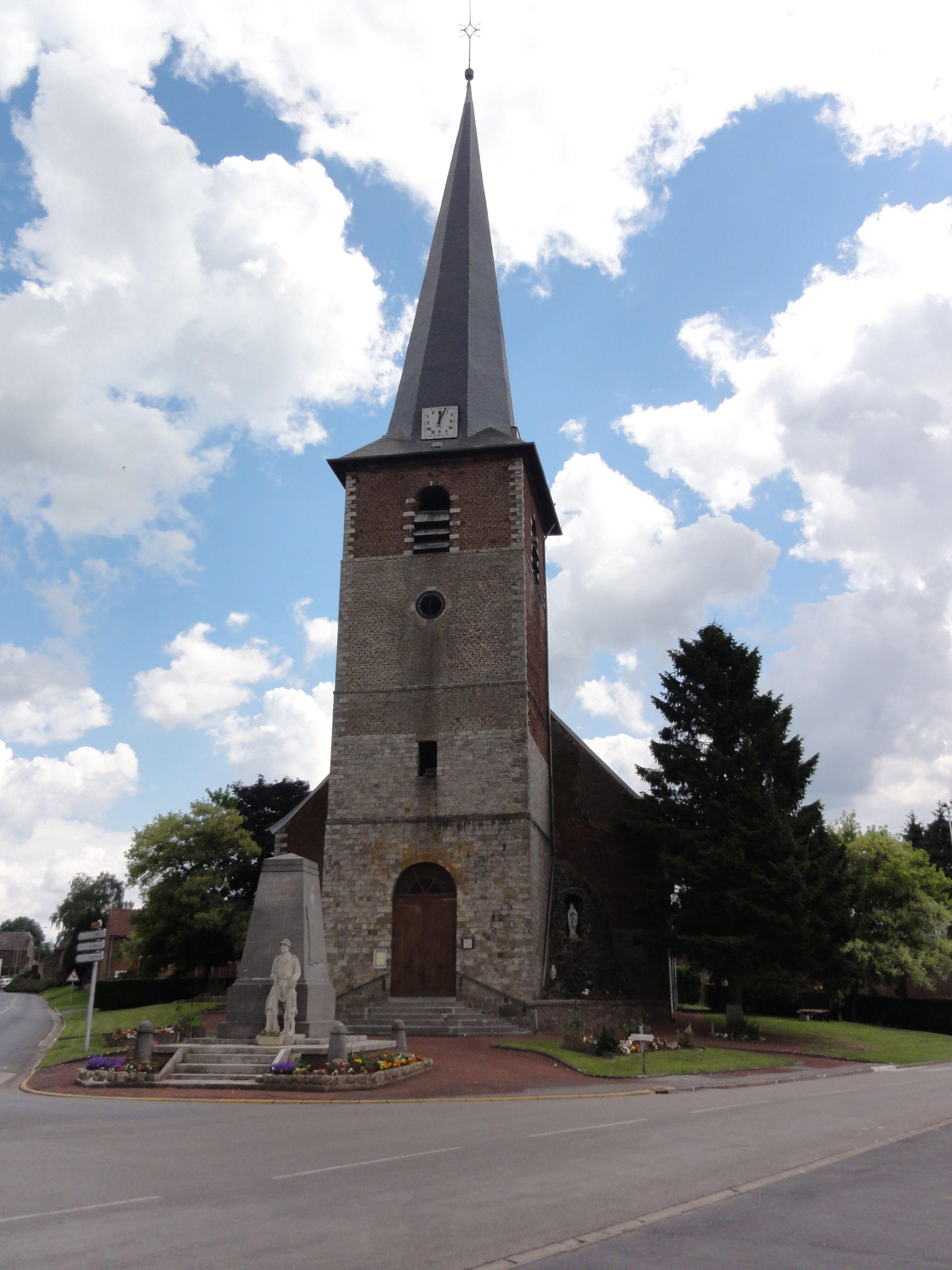 Preux-aux-Bois (Nord, Fr) église